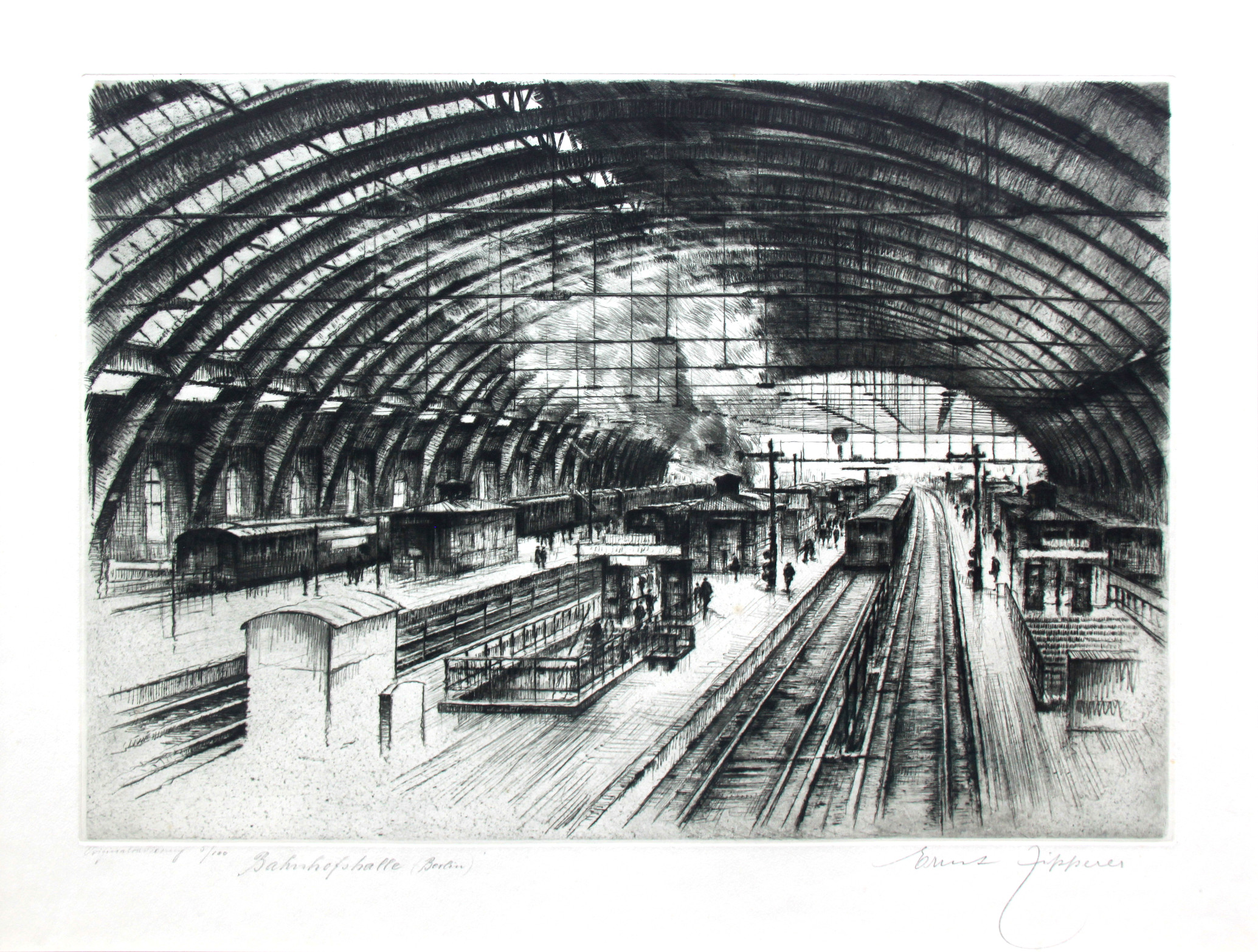 Bahnhofshalle Berlin, Schlesischer Bahnhof, Kaltnadelradierung